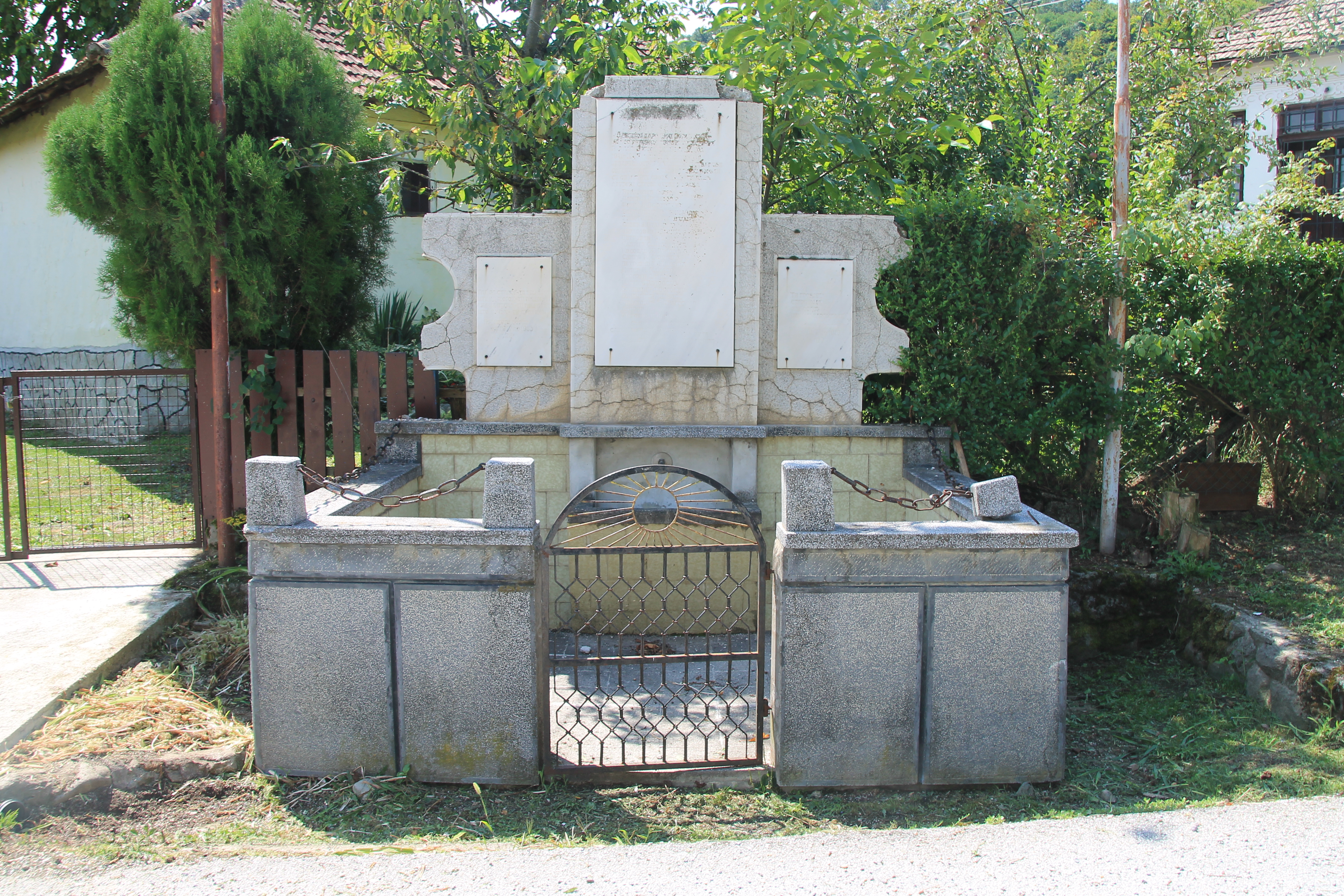 Velike Pčelice